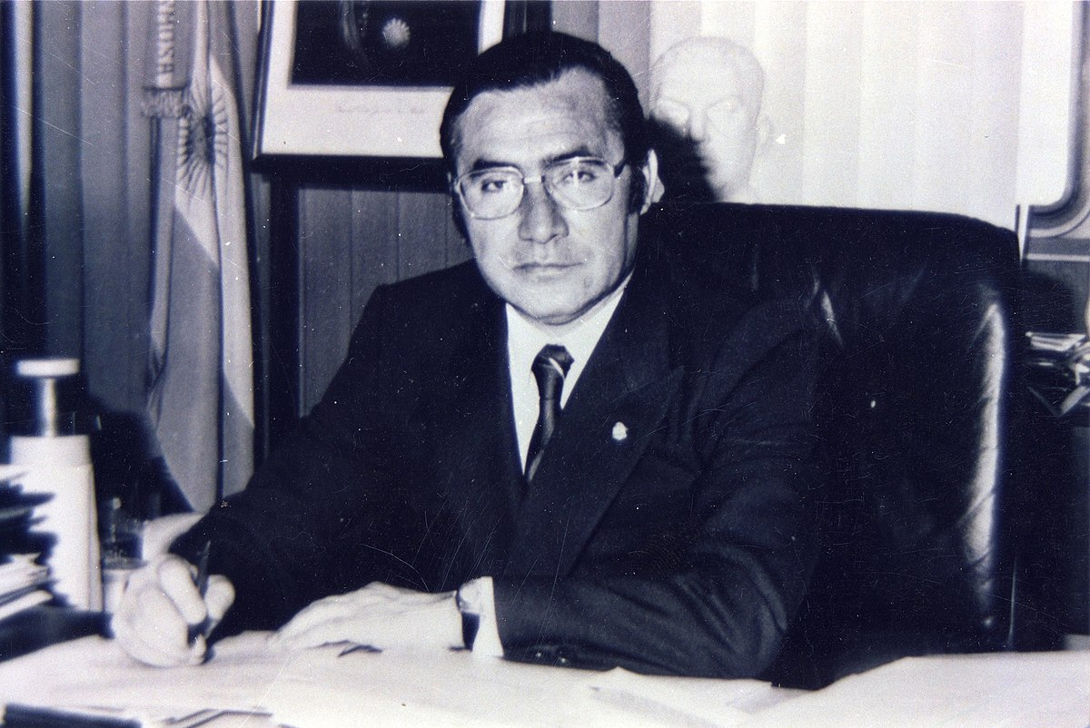 Floro Bogado, Gobernador de Formosa entre 1983 y 1983, y Vicegoberndor de Formosa entre 1995 y 2017.